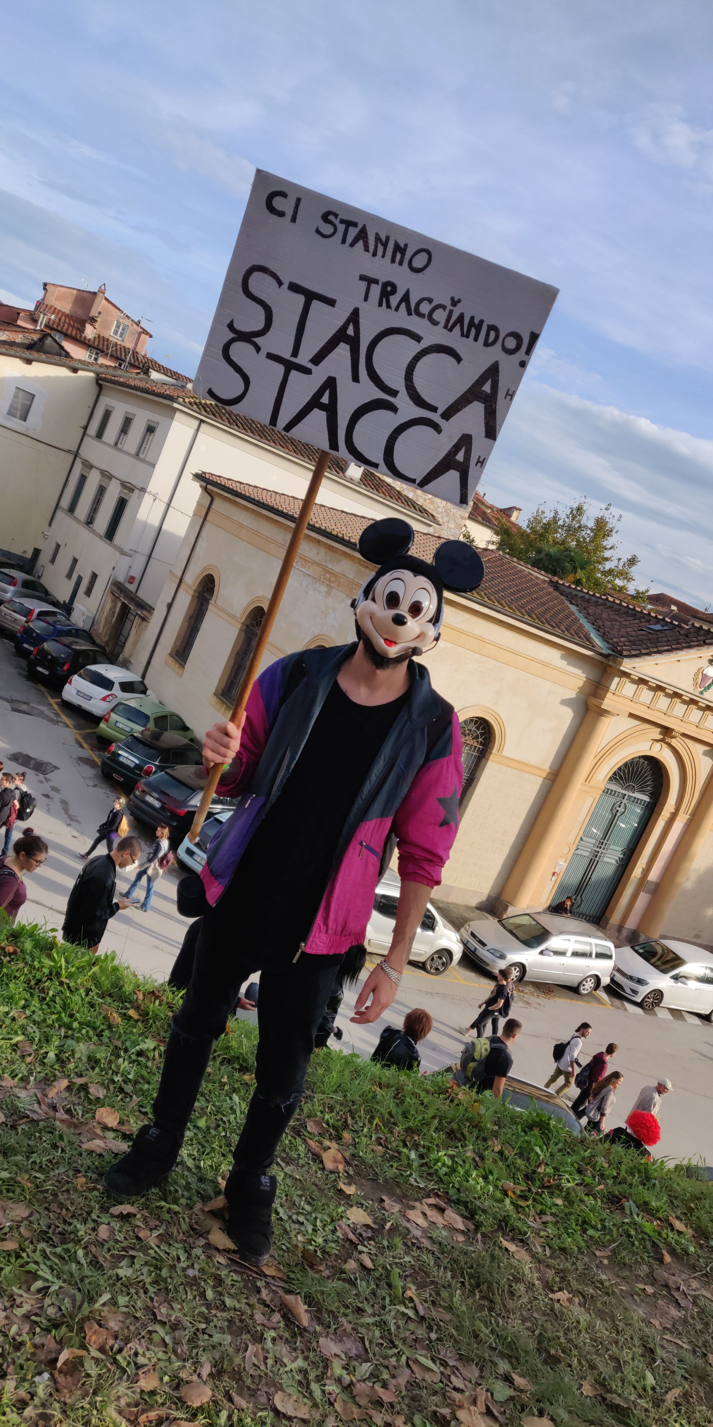 «Ci stanno tracciando! STACCAh STACCAh» cosplay Hackerino al Lucca Comics scattata da Cristiano Paris.